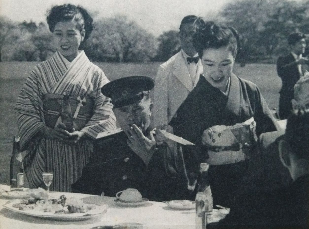 対日理事会ソ連代表のアレクセイ・キスレンコ少将（新宿御苑にて）